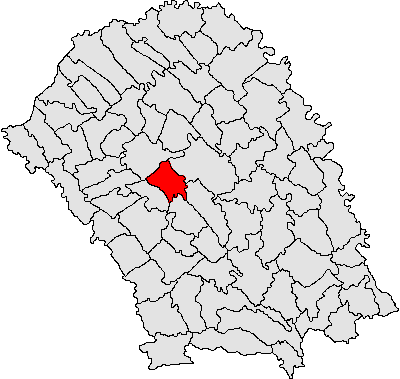 Categorie:Hărţi ale judeţului Botoşani